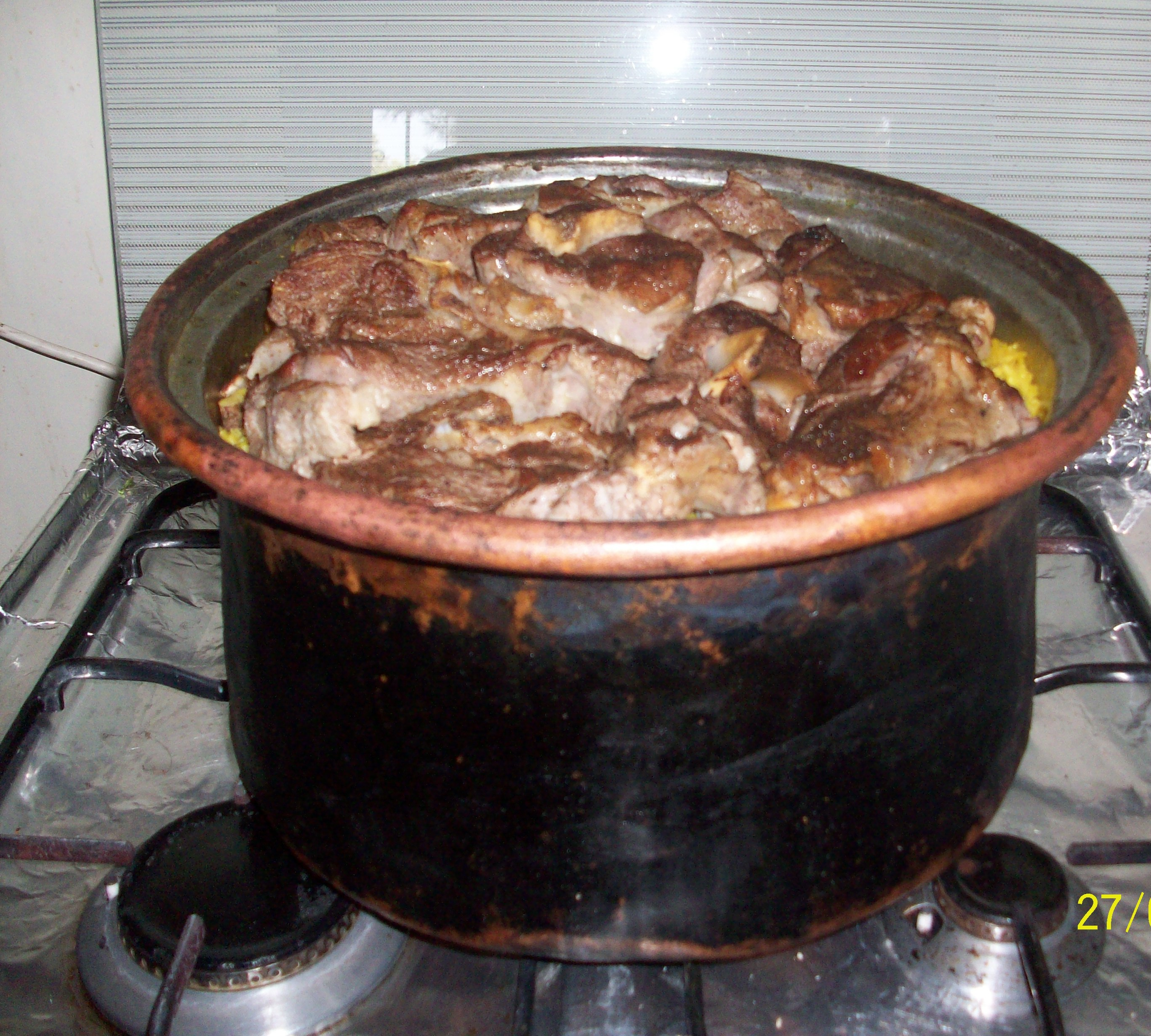 القدرة الخليلية من أهم الأكلات التي تشتهر بها مدينة الخليل